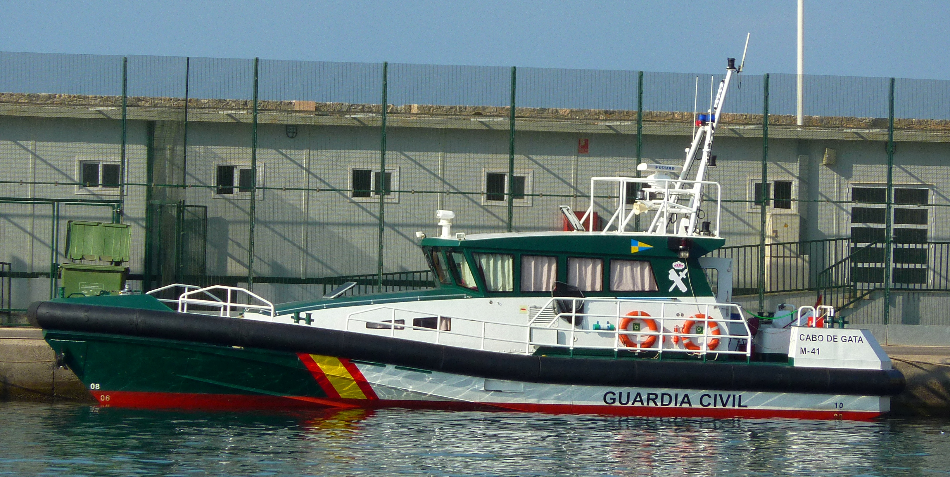 Patrullera del Servicio Marítimo de la Guardia Civil "Cabo de Gata".